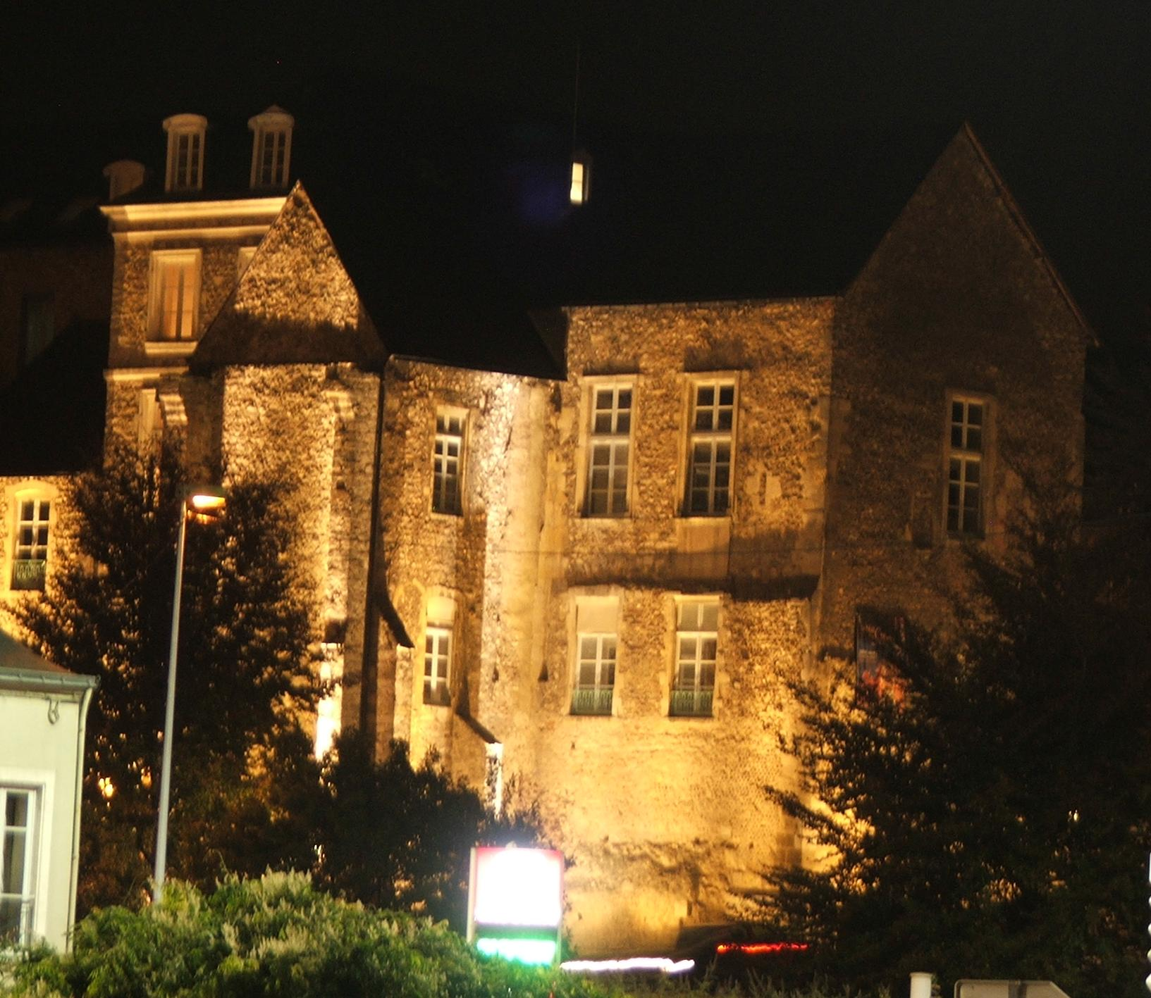 Photo de nuit de la façade sud du palais des comtes du Maine depusi la place des Jacobins au Mans.